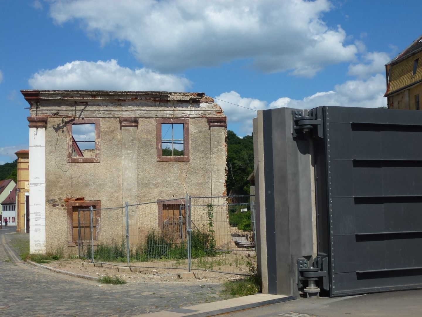 Hochwasser-Sperrtor an der Großmühle in Grimma